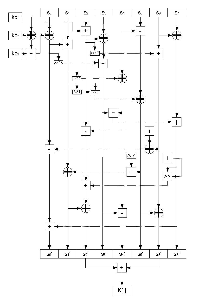 Раунд перемешивания ключа